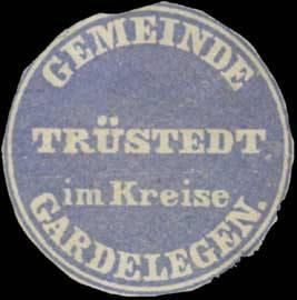 Sealing stamp Title: Gemeinde Trüstedt Description: im Kreis Gardelegen, blau, weiß Place: Trüstedt size: 3 cm